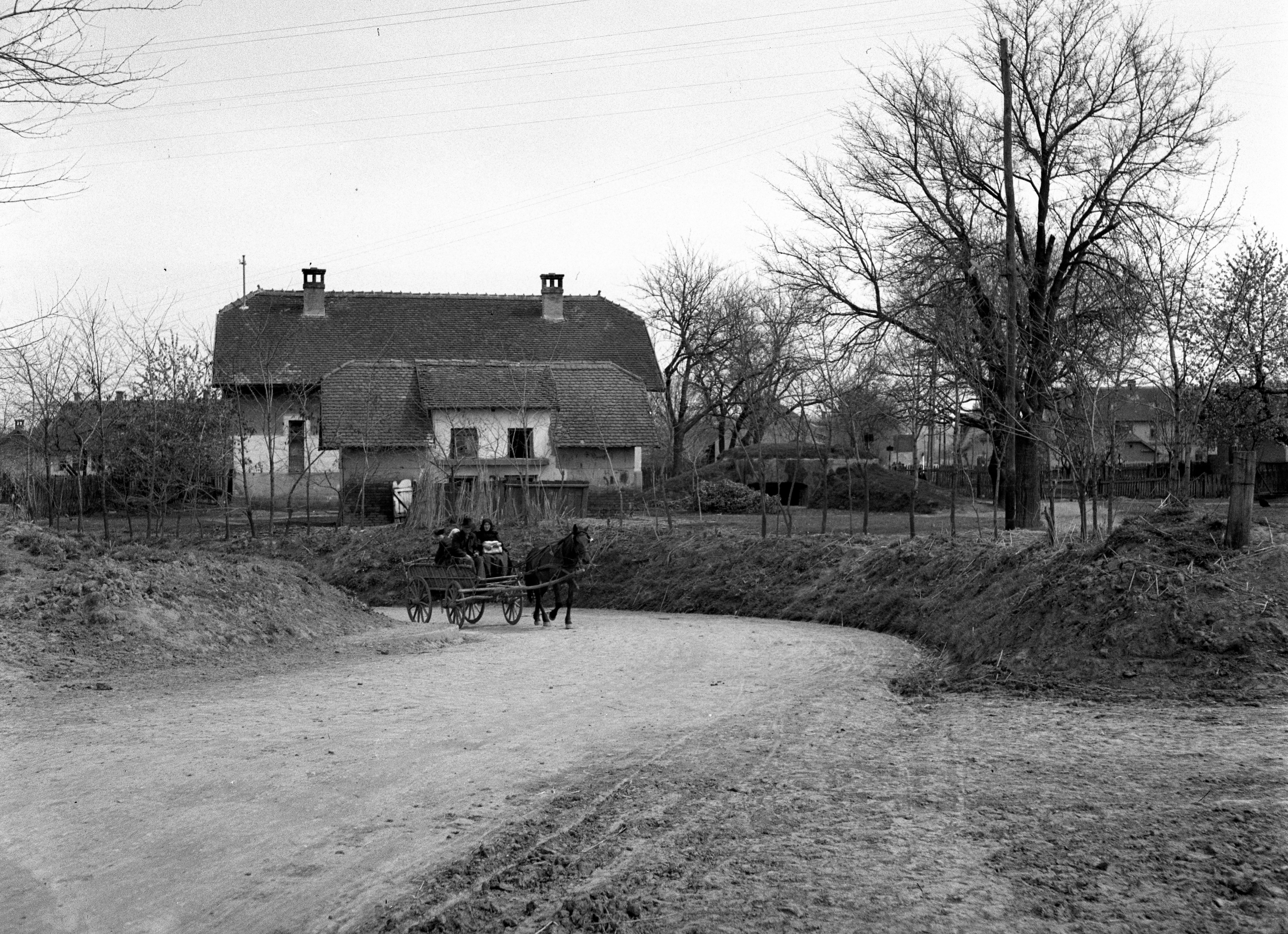 Bartók Béla utca a vasúti felüljáró közelében. Location: Croatia, Beli Manastir Tags: chariot, horse Title: Bartók Béla utca a vasúti felüljáró közelében.